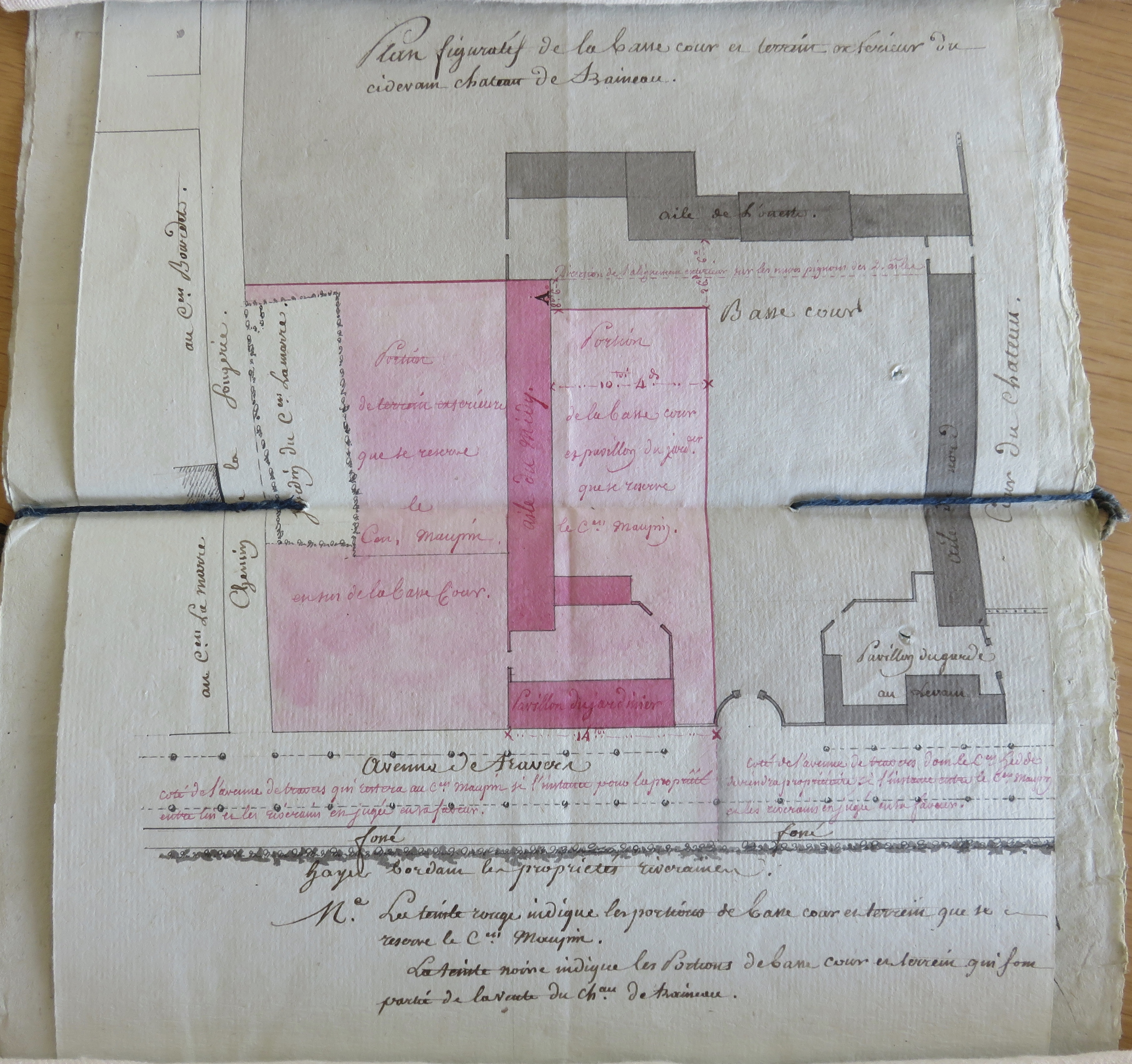 Le château de Tresneau acheté en bien national le 13 juillet 1797 par un architecte de Versailles, Charles-Théodore Maupin a été démembré par lui. Une part de la basse-cour a été revendue à un propriétaire de Versailles ( la partie en noir)